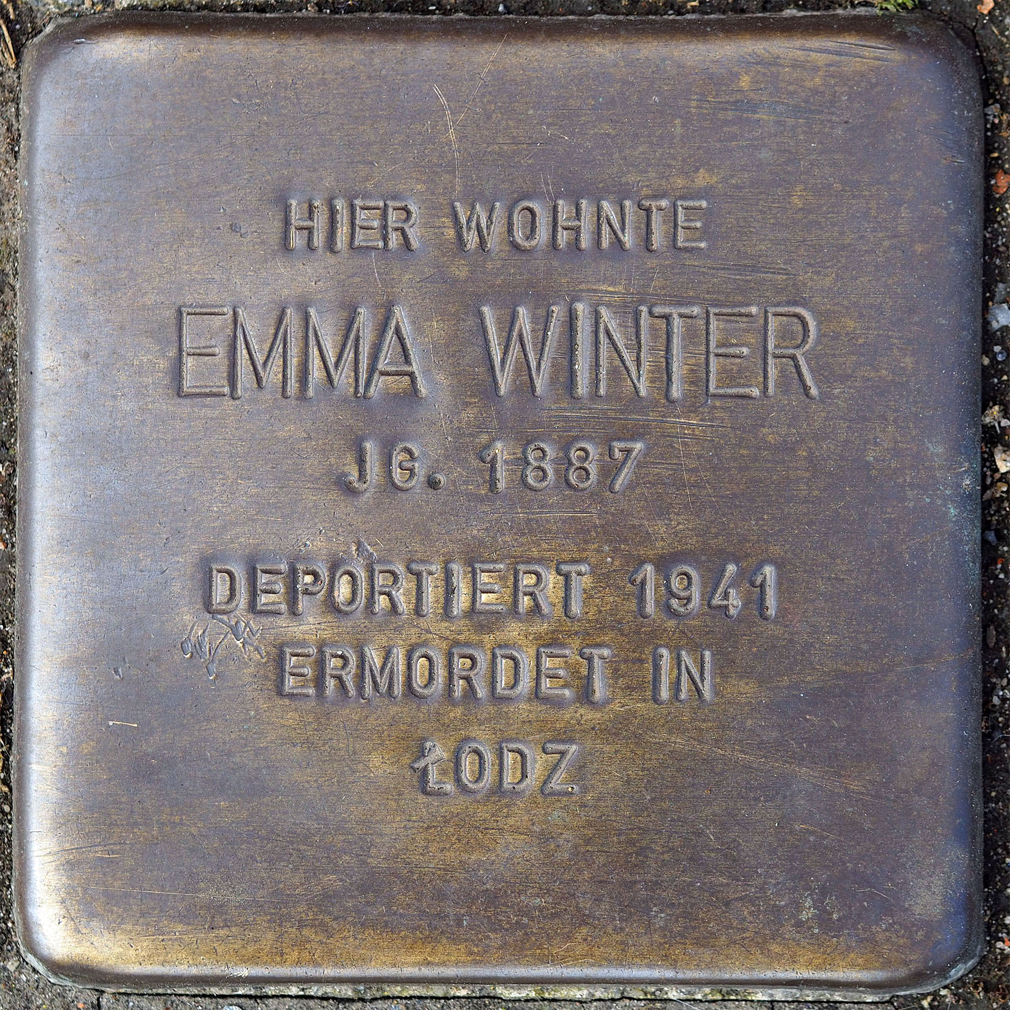 Stolpersteine Korschenbroich: Winter, Emma